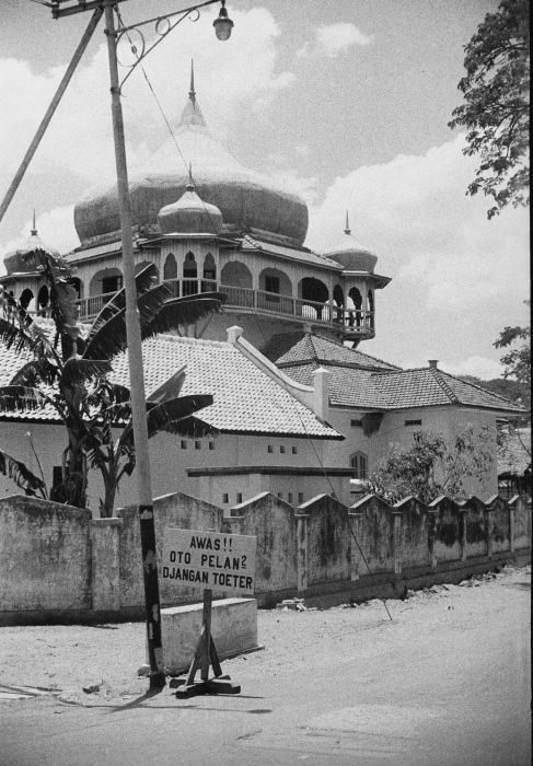 negatief. Straatgezicht met moskee en een waarschuwingsbord voor het verkeer